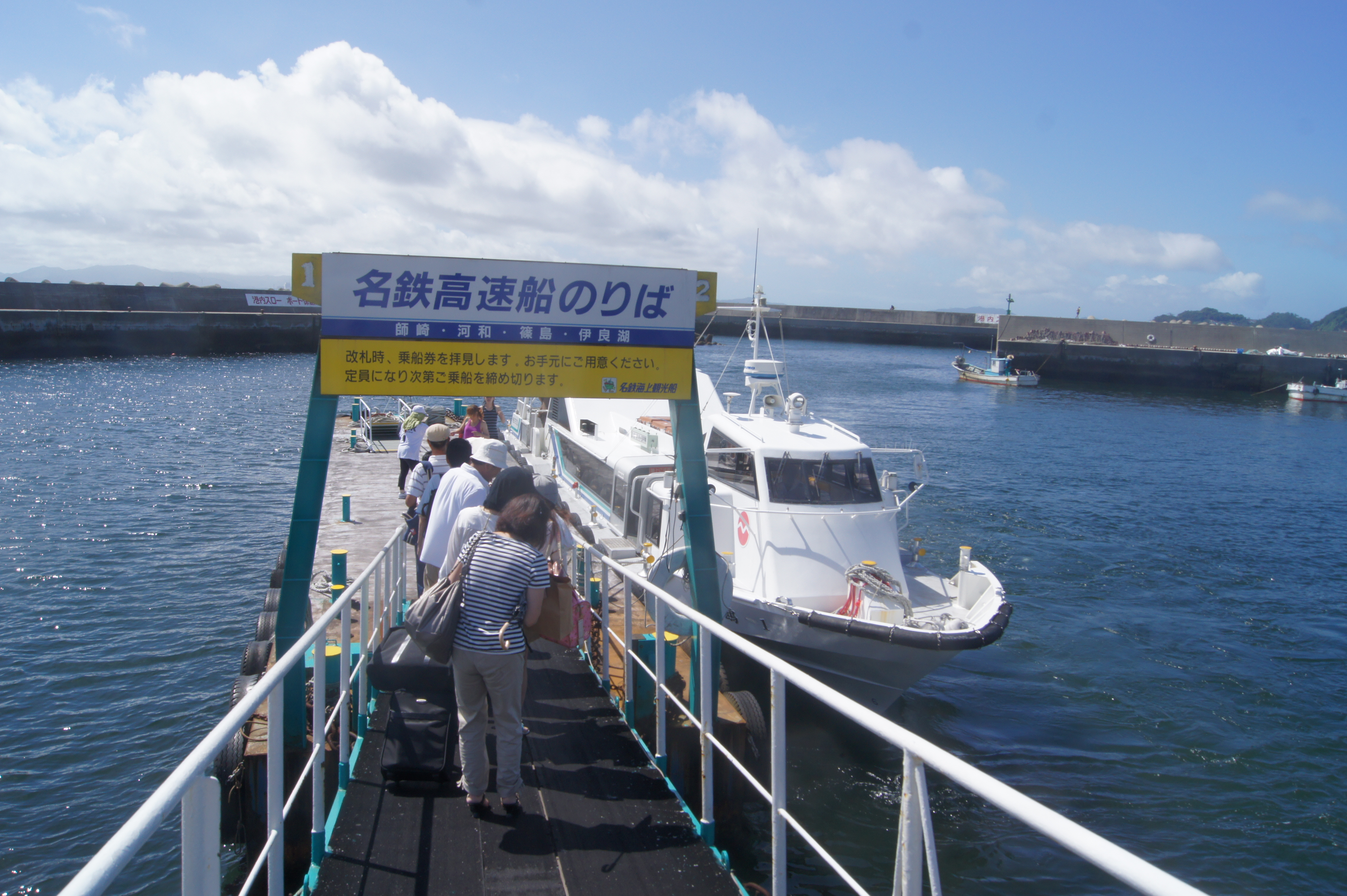 日間賀島にあるja:名鉄海上観光船の乗船場（西港）